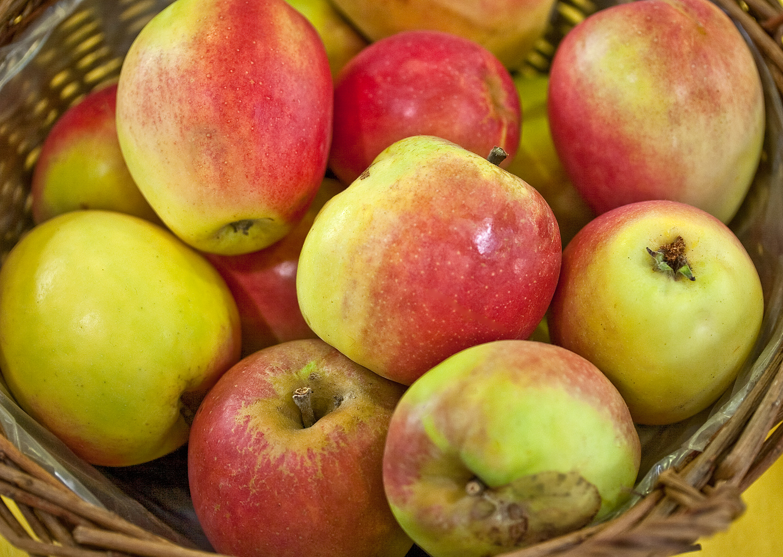 Der Kardinal Sinap ist eine Apfelsorte